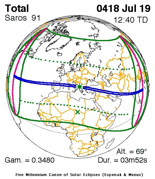 Eclipse Predictions by Fred Espenak, NASA/GSFC". Prediction for 19 July, 418